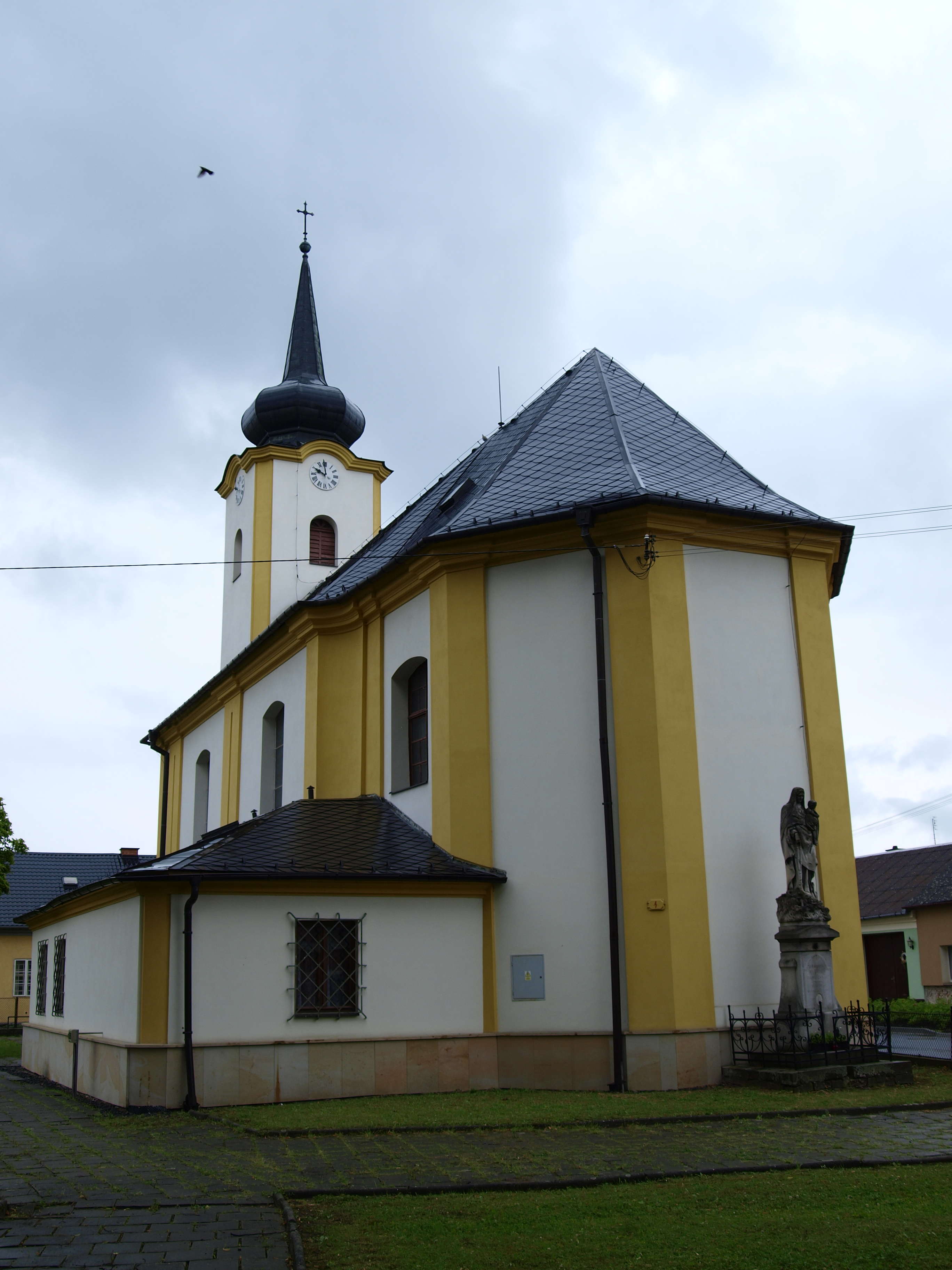 Pňovice, klasicistní kostel svatého Václava od jihu